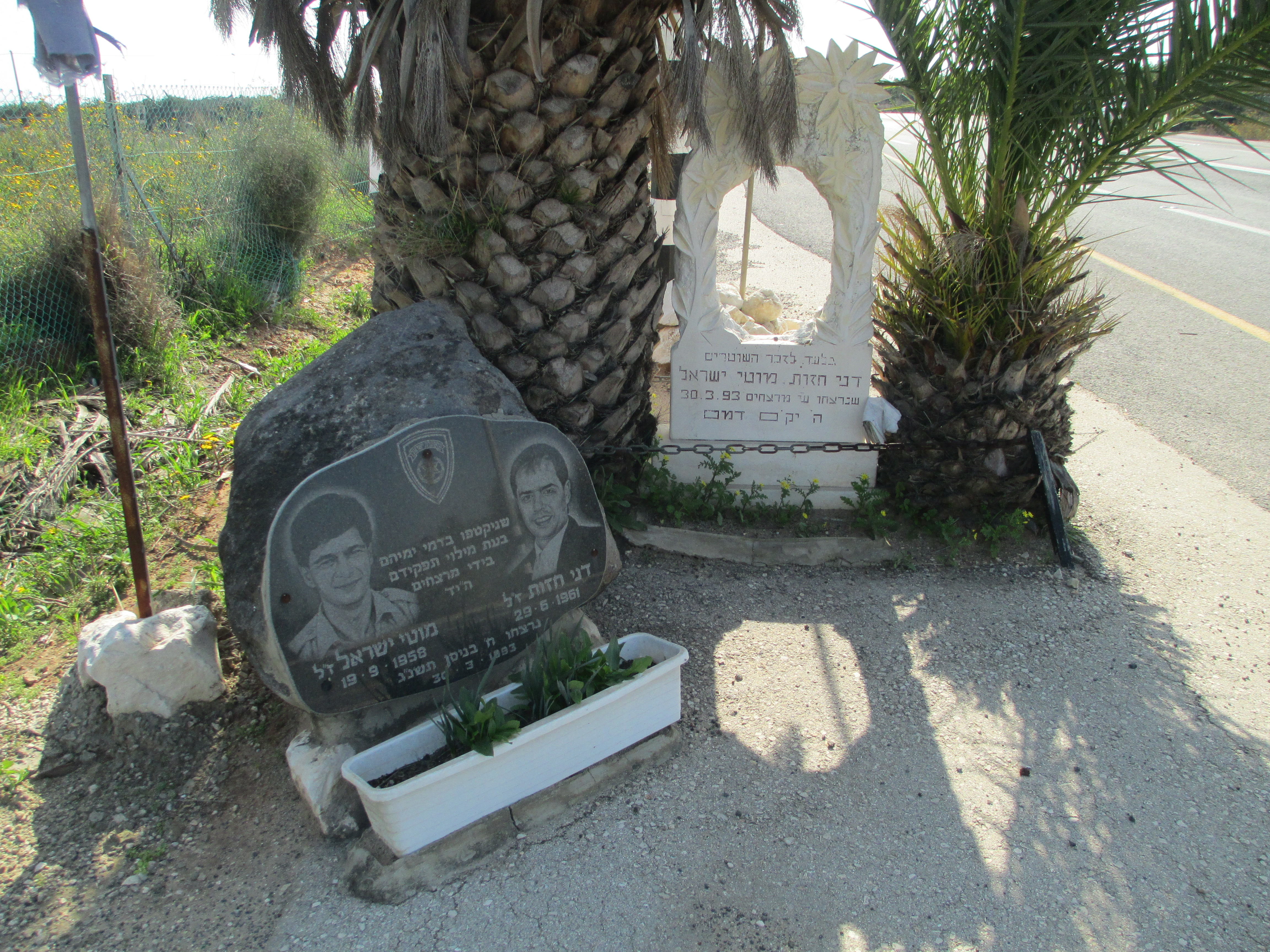 אנדרטה לשני שוטרים שנרצחו בפיגוע בצומת תלמי אלעזר